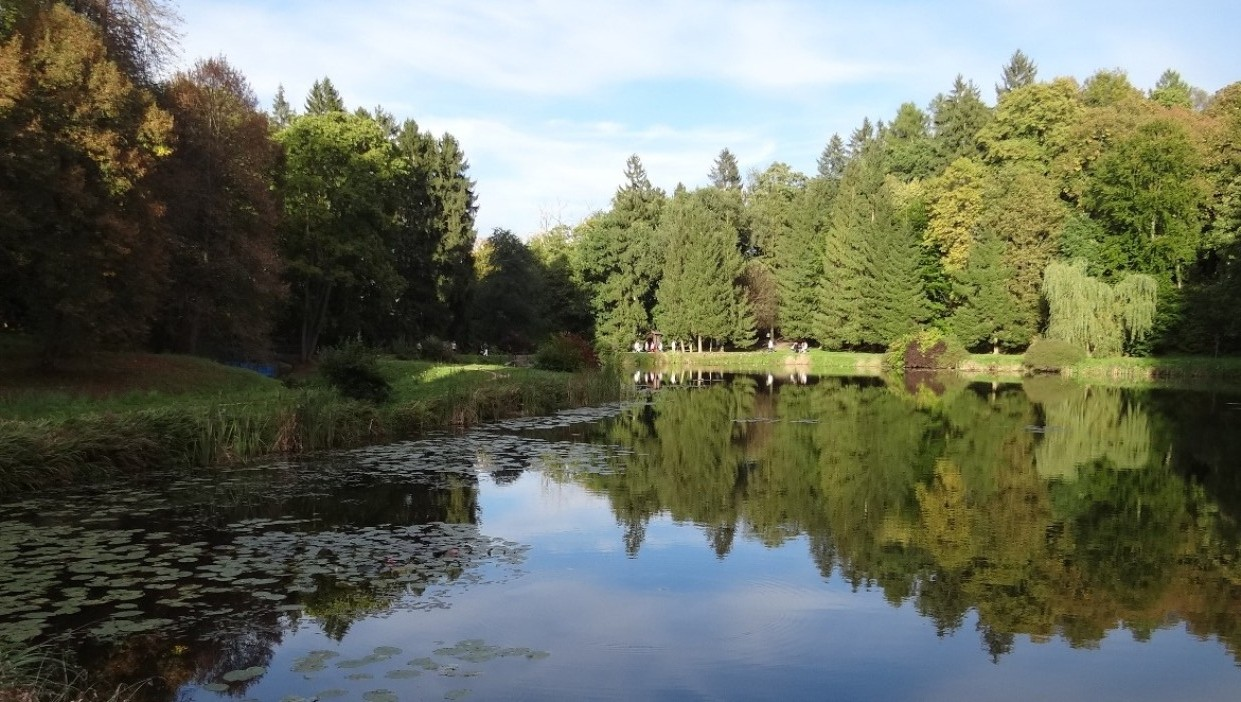 Park Zdrojowy, Połczyn-Zdrój